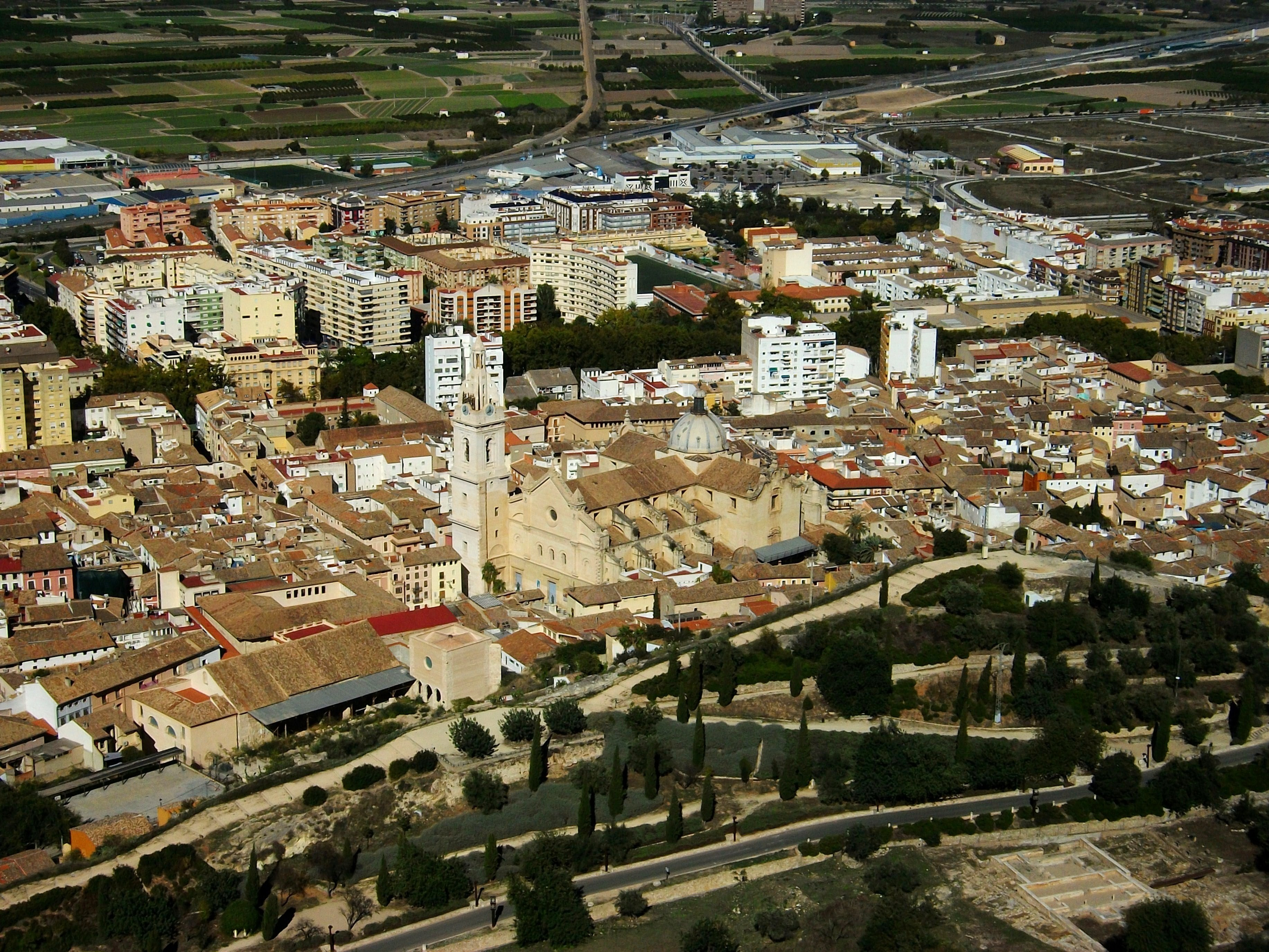 Vista de la ciutat de Xàtiva des del castell.